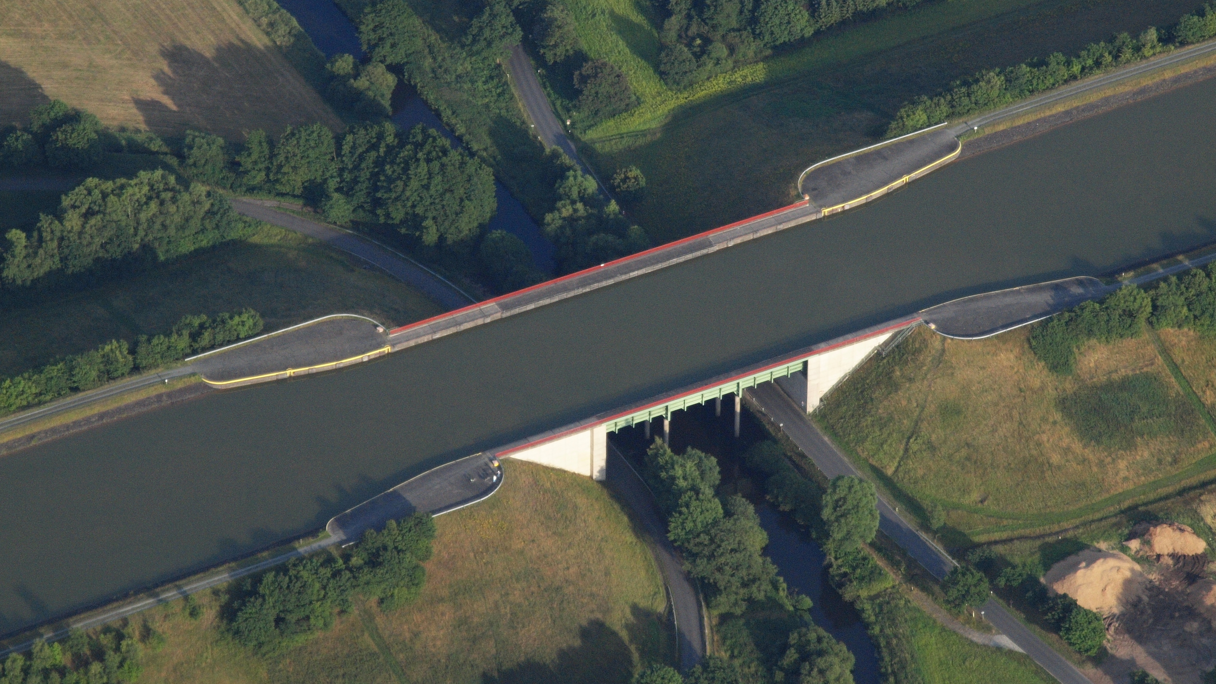 Straßenüberführung Nähe Schleuse Uelzen, Luftaufnahme (2014)